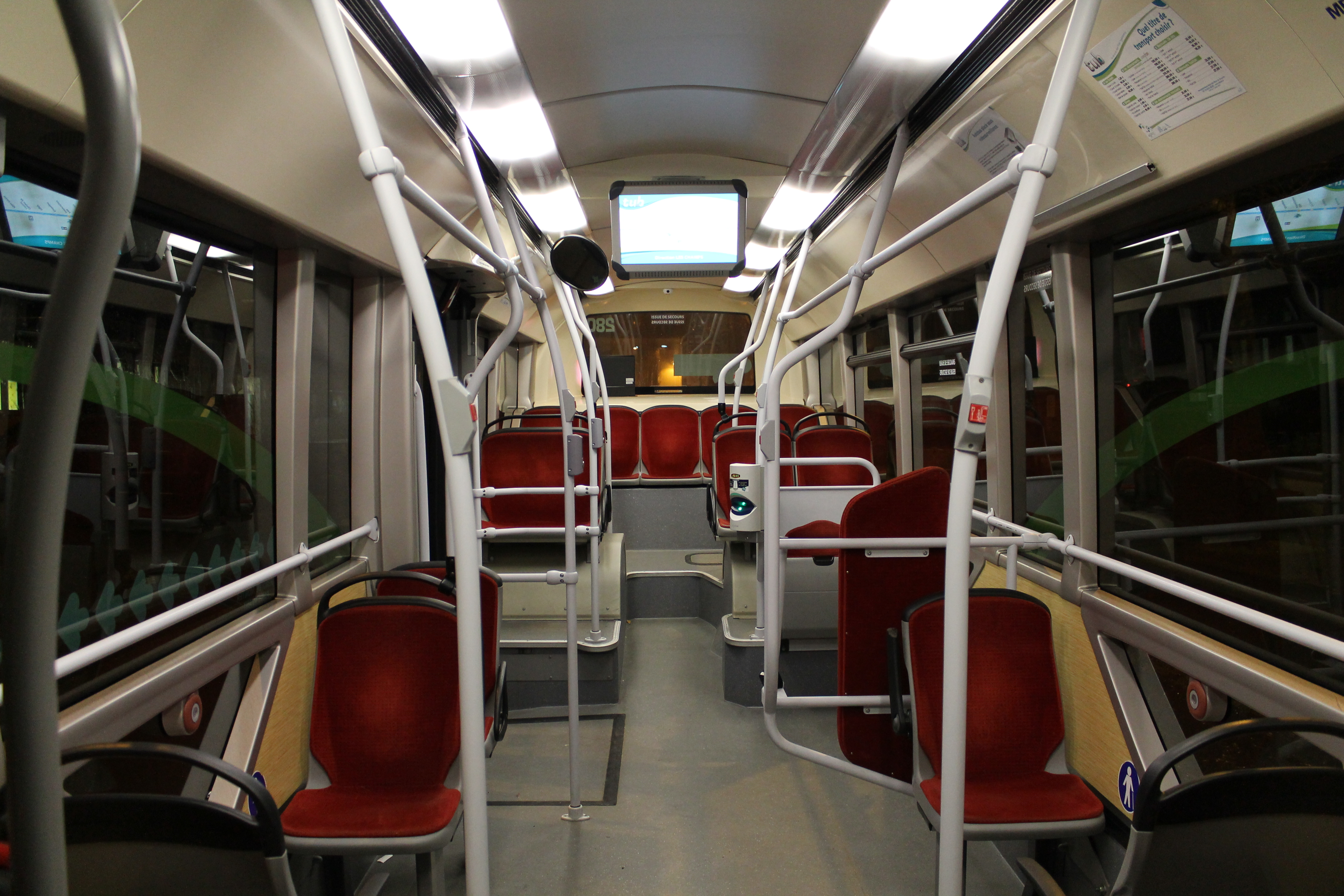 Intérieur d'un Heuliez GX-127.L du réseau TUB